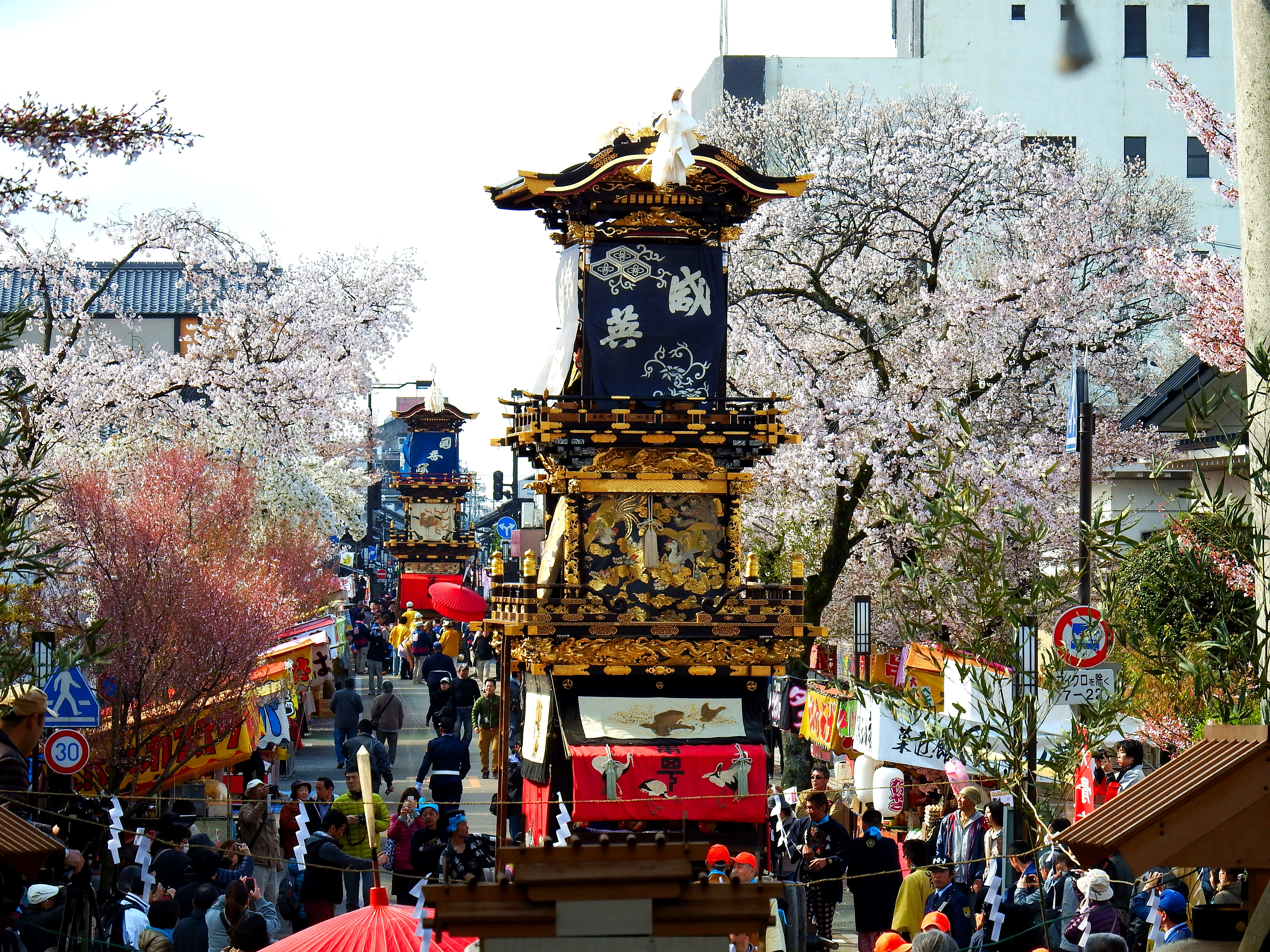 山車からくり